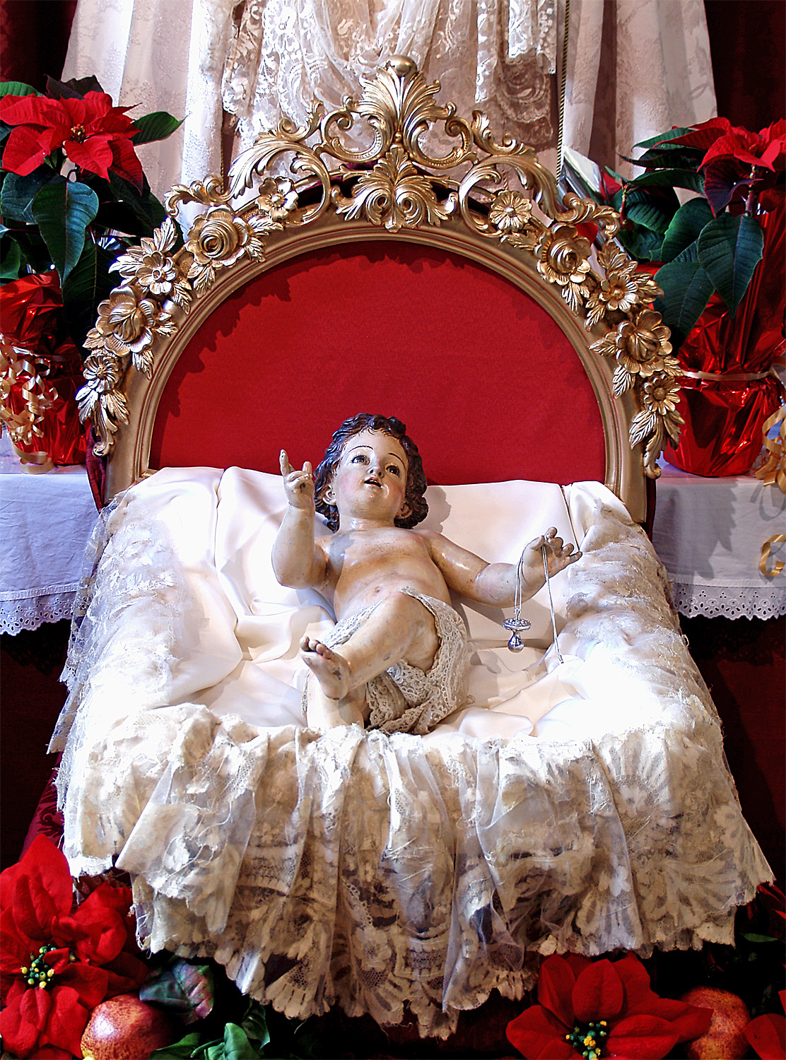 Bendito Niño Jesús de Ntra. Sra. de las Mercedes, expuesto a la veneración durante la Navidad 2008.